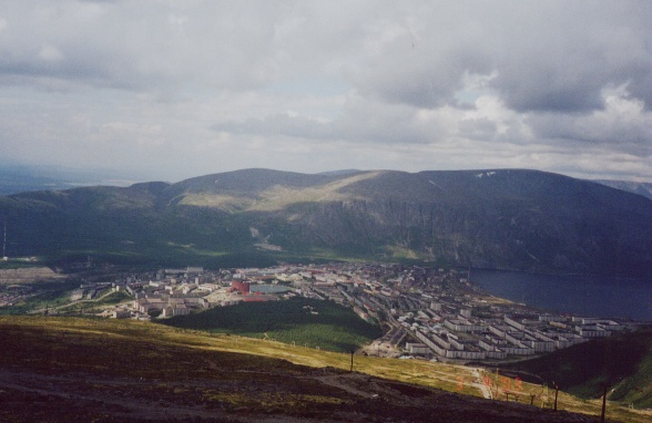 Кировск, панорама города. Озеро Большой Вудъявр.